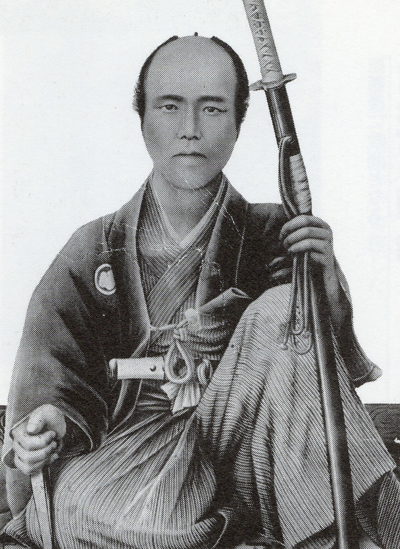 世良修蔵の肖像写真。